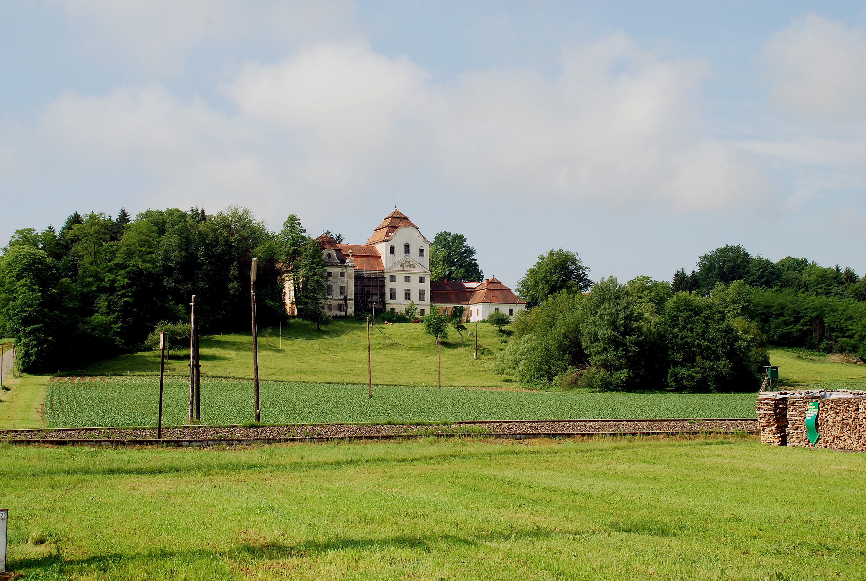 Sulmeck-Greith, Steiermark, Österreich: Schloss Welsberg im Ortsteil Dietmannsdorf